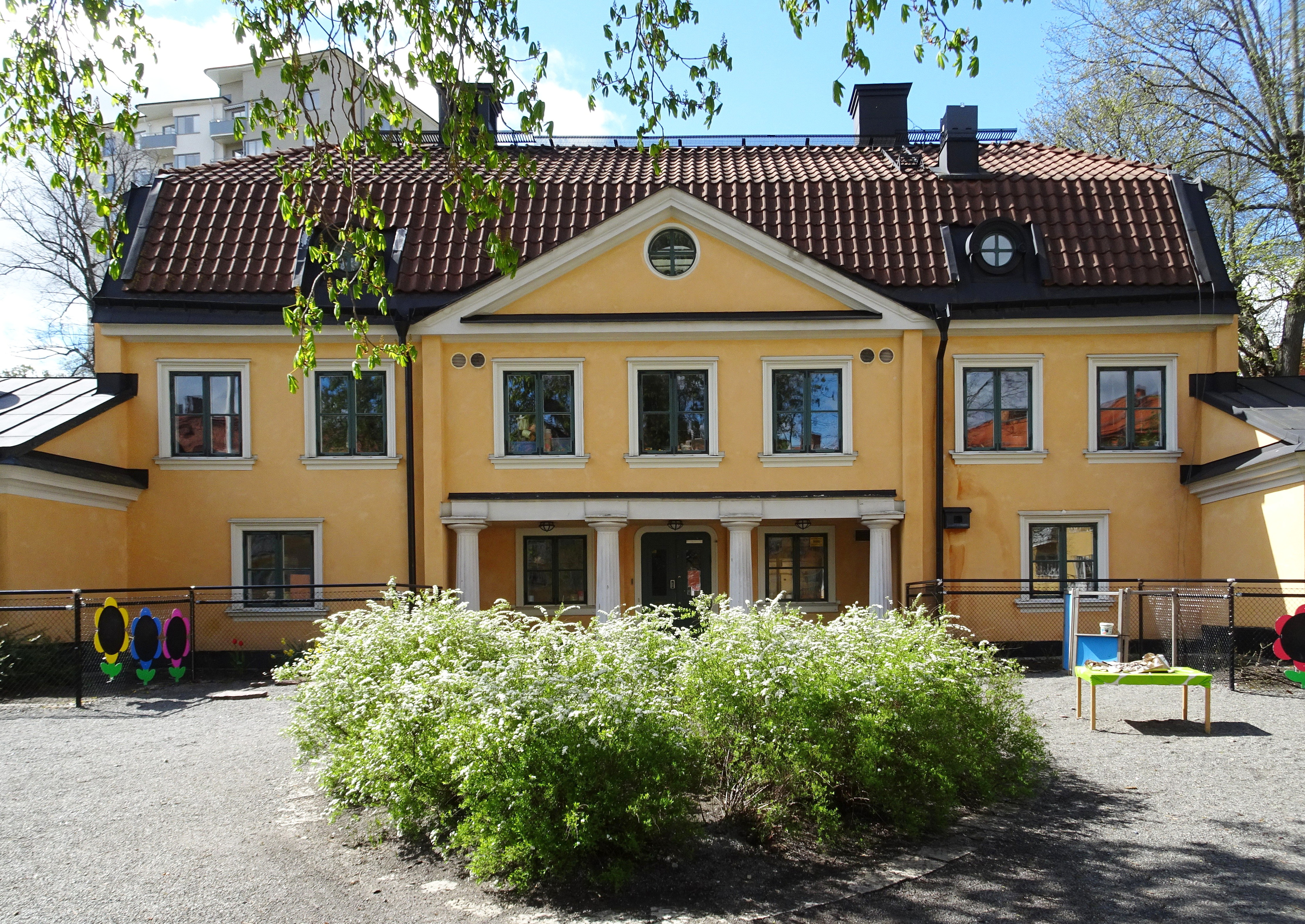 Reimers malmgård, fasad mot norr